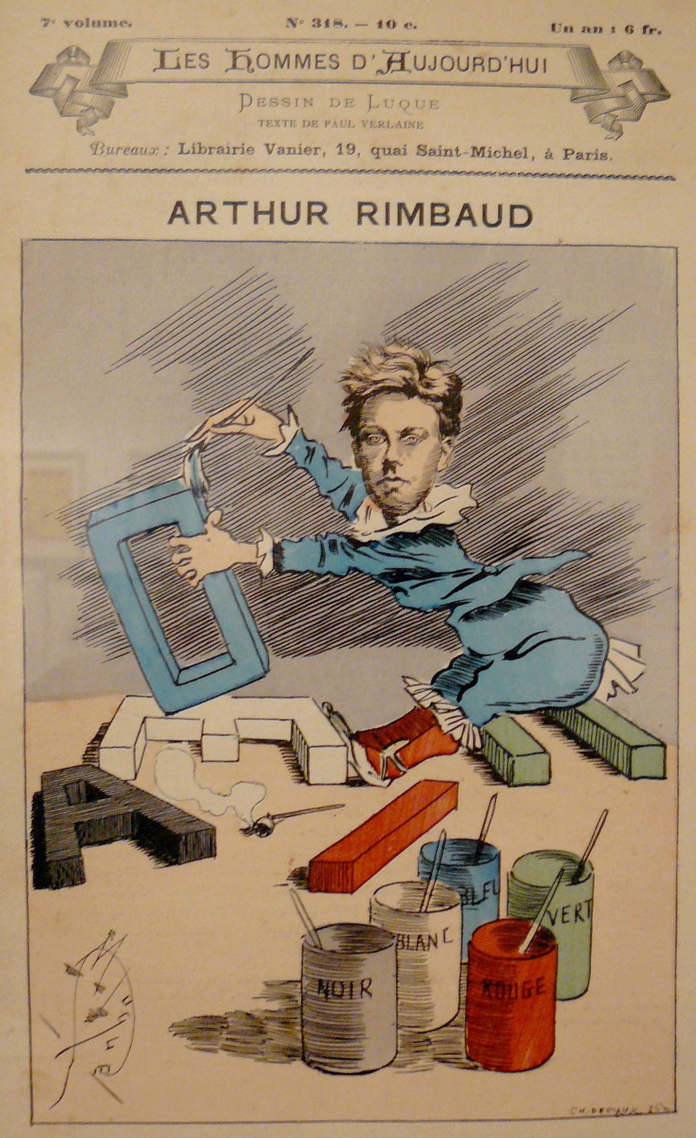 Revue "Les Hommes d'aujourd'hui" n°318, janvier 1888 - Couverture humoristique du dessinateur Luque Arthur Rimbaud : Voyelles. Photographié lors de l'exposition "Rimbaudmania" Paris.